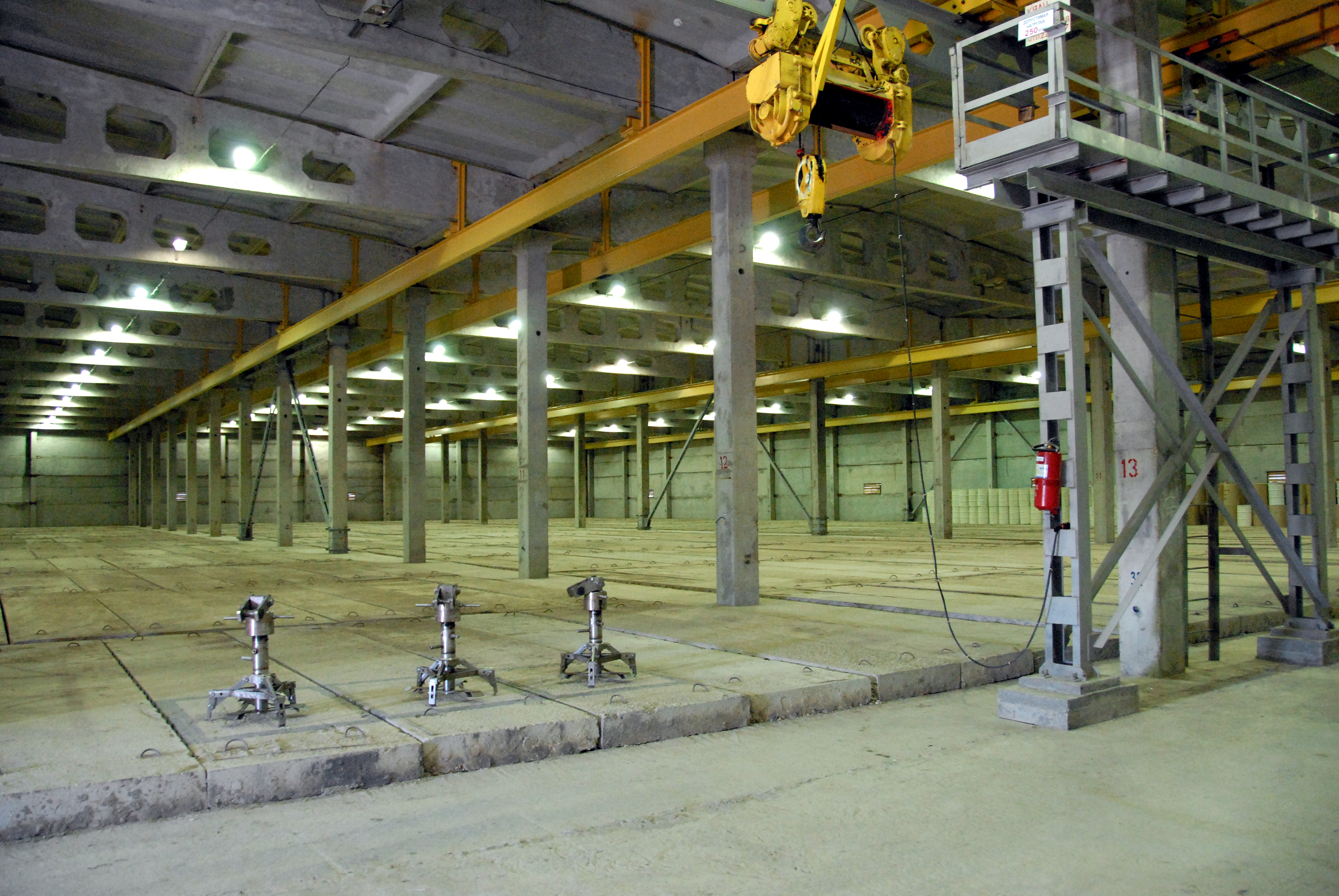 Хранилище твёрдых радиоактивных отходов на Балаковской АЭС